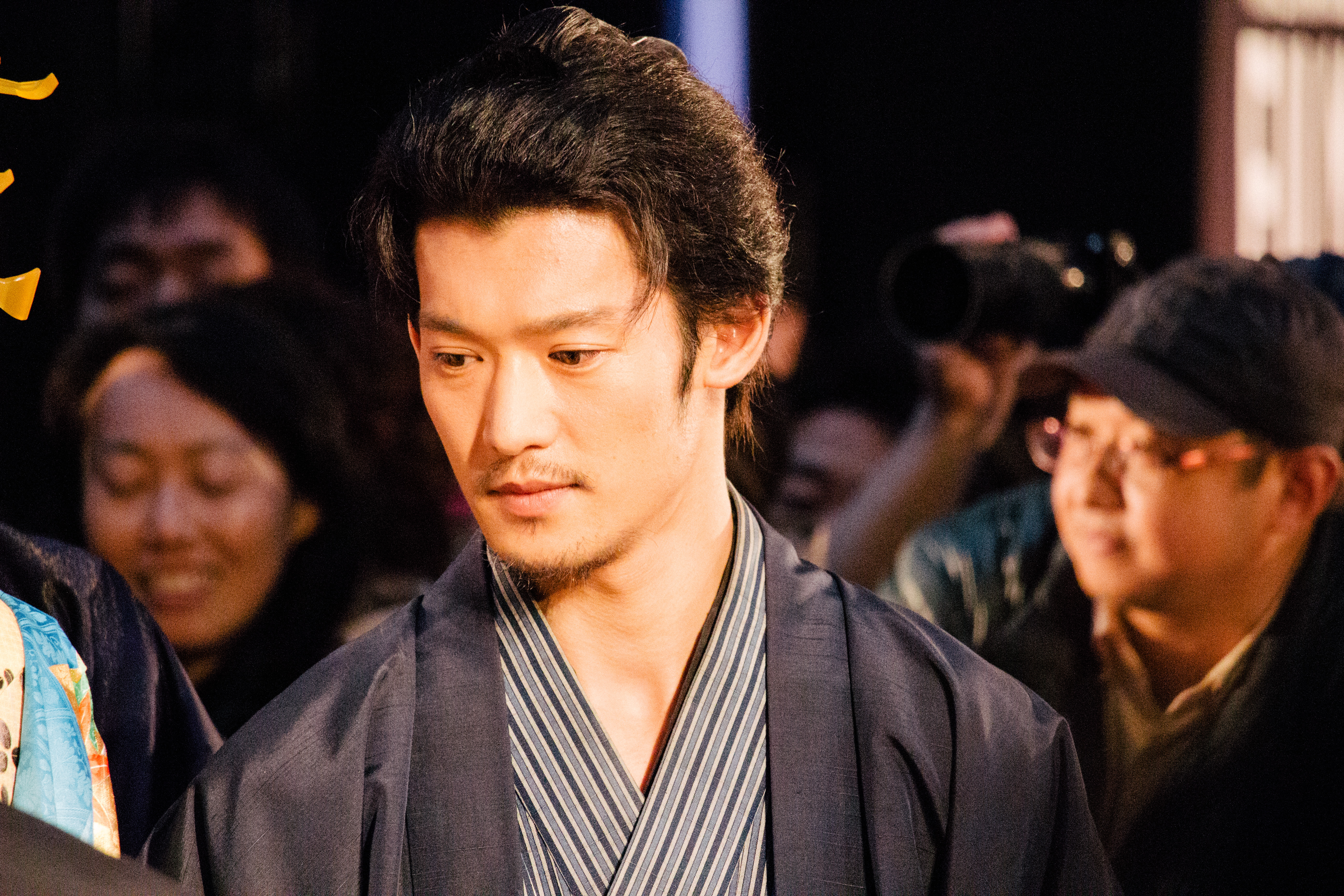 第27回 東京国際映画祭 淵上泰史 (花宵道中)